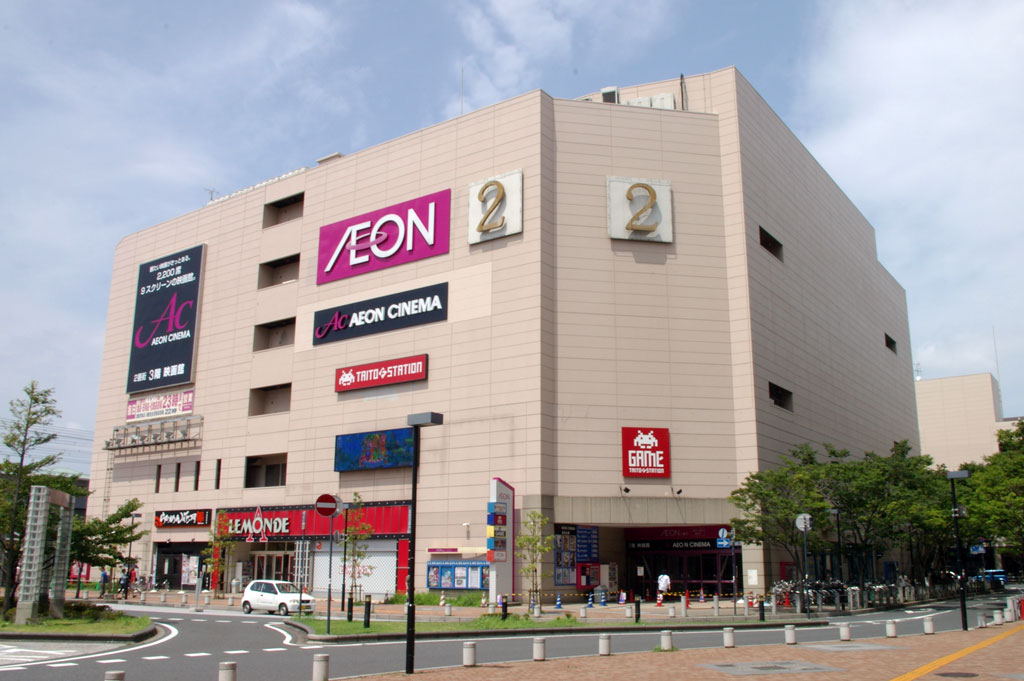 イオン市川妙典店2番街外観